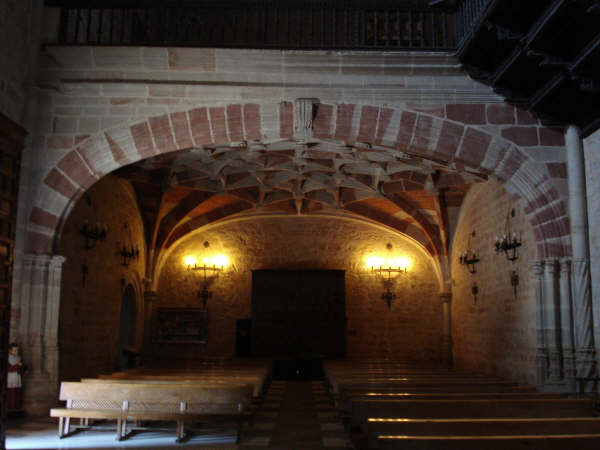 Interior de la Iglesia Parroquial de Villahermosa (Ciudad Real)